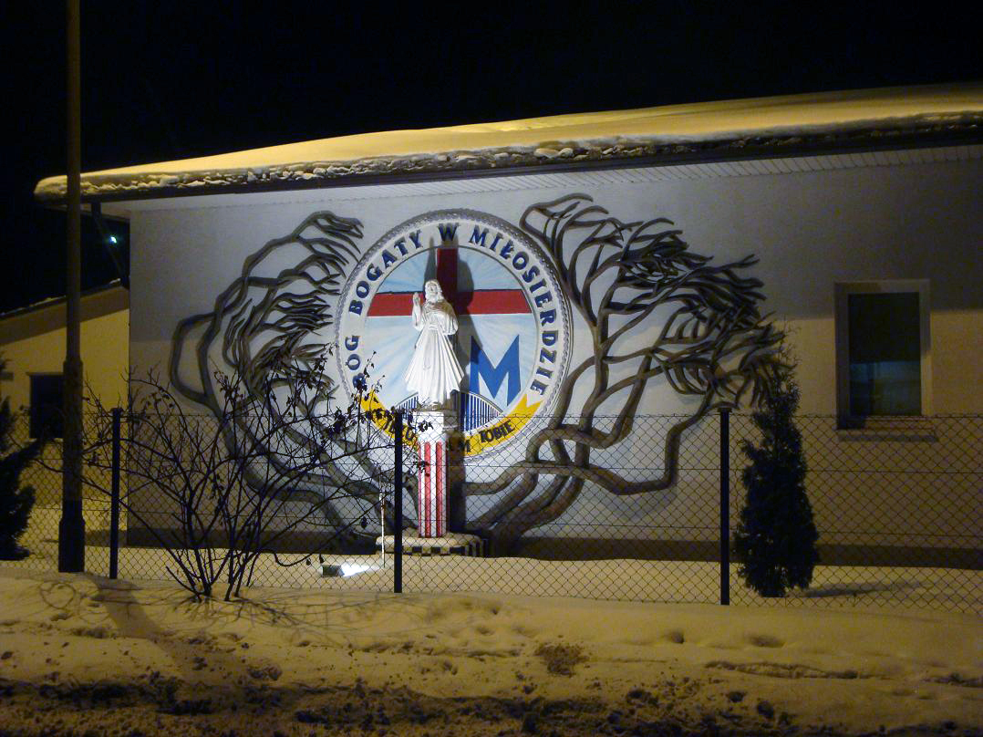 Hospicjum ojca Pio w Tarnobrzegu - Wymysłowie. Rzymskokatolicka parafia Matki Bożej Nieustającej Pomocy.